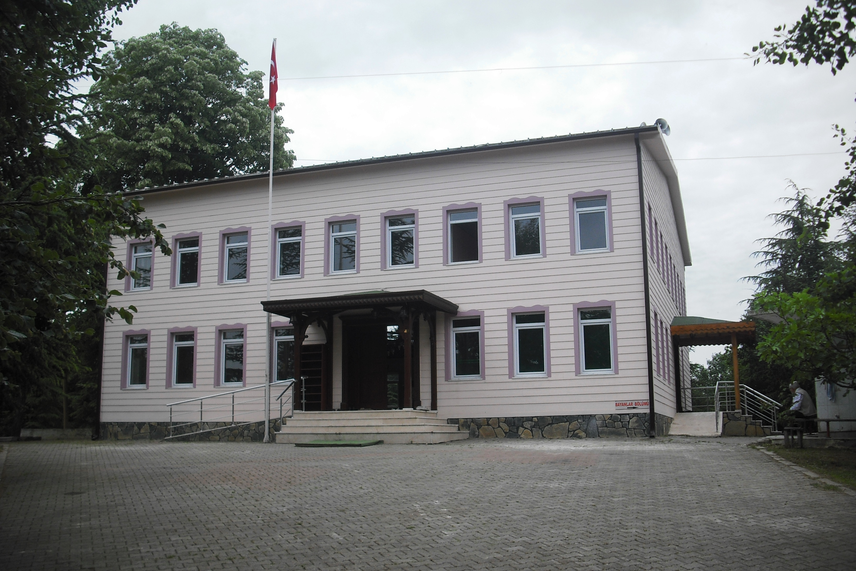 Çamdağı üzerinde Seman Dede türbe ve Camii